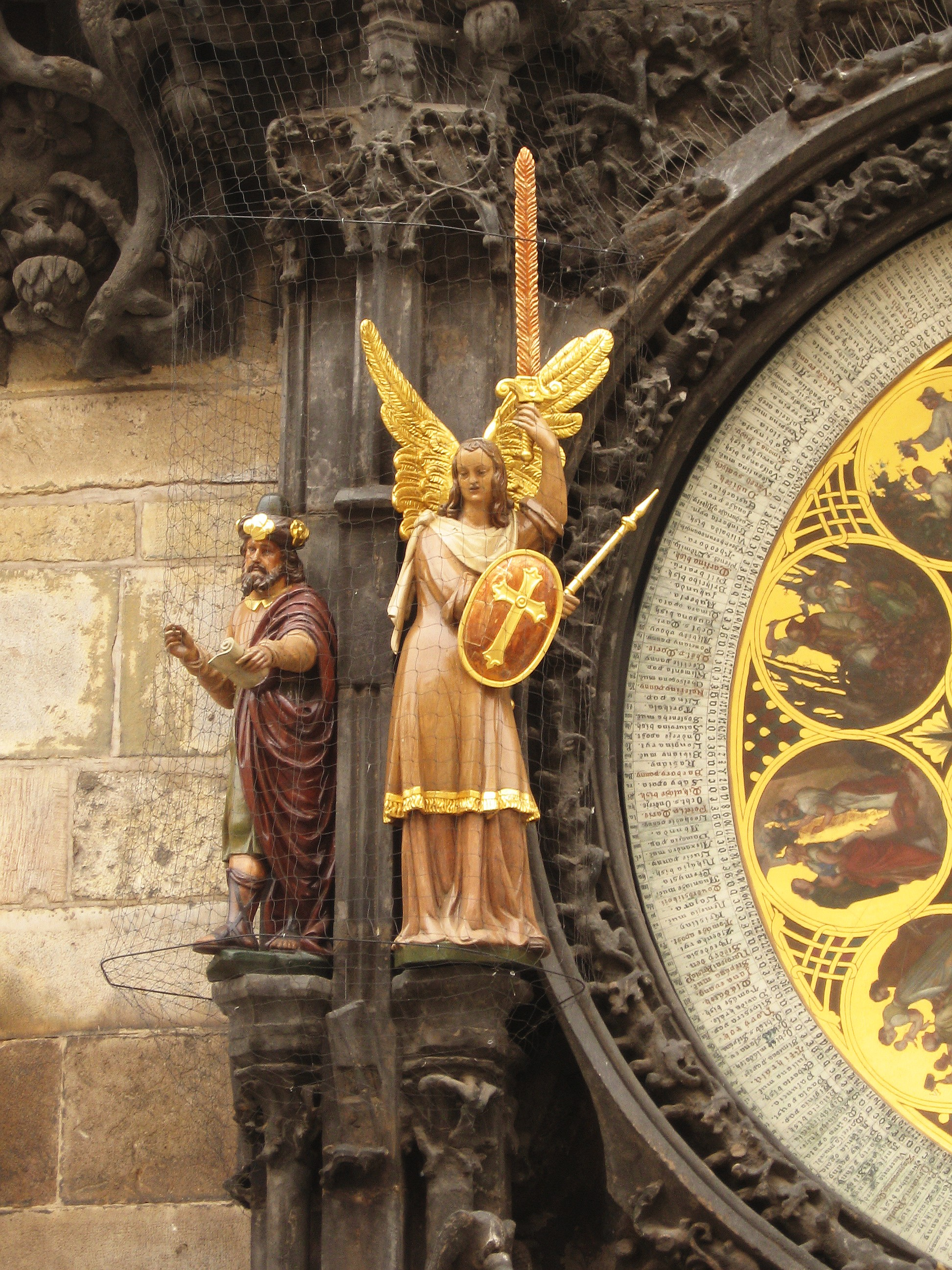 Pražský orloj. Sochy filozofa a anděla.